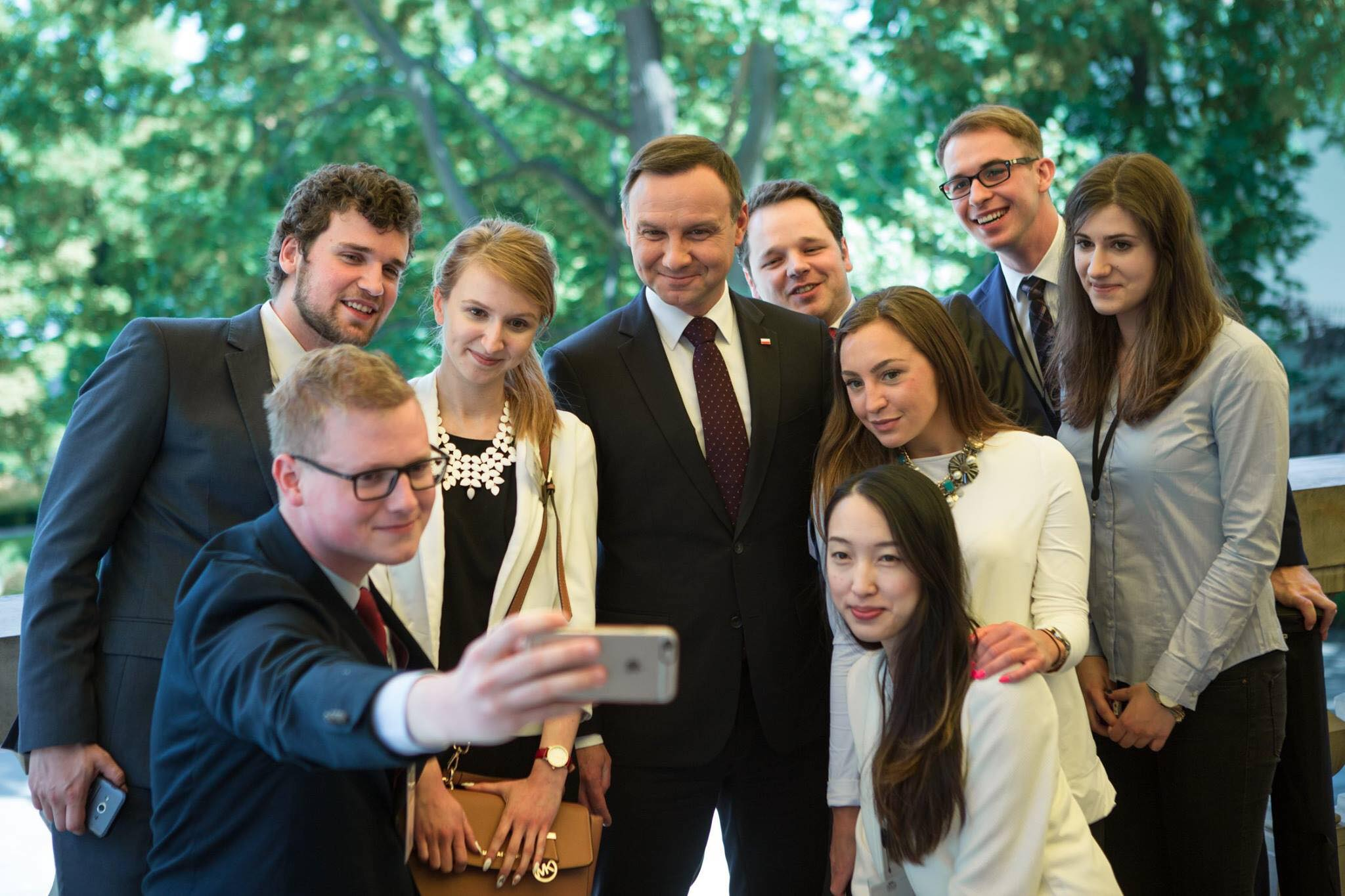 Spotkanie członków projektu Warsaw-Beijing Forum z prezydentem Andrzejem Dudą